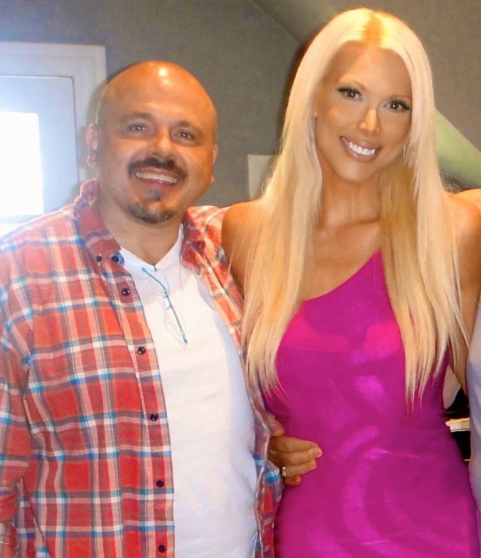 Walter Afanasieff and Tamara Gee